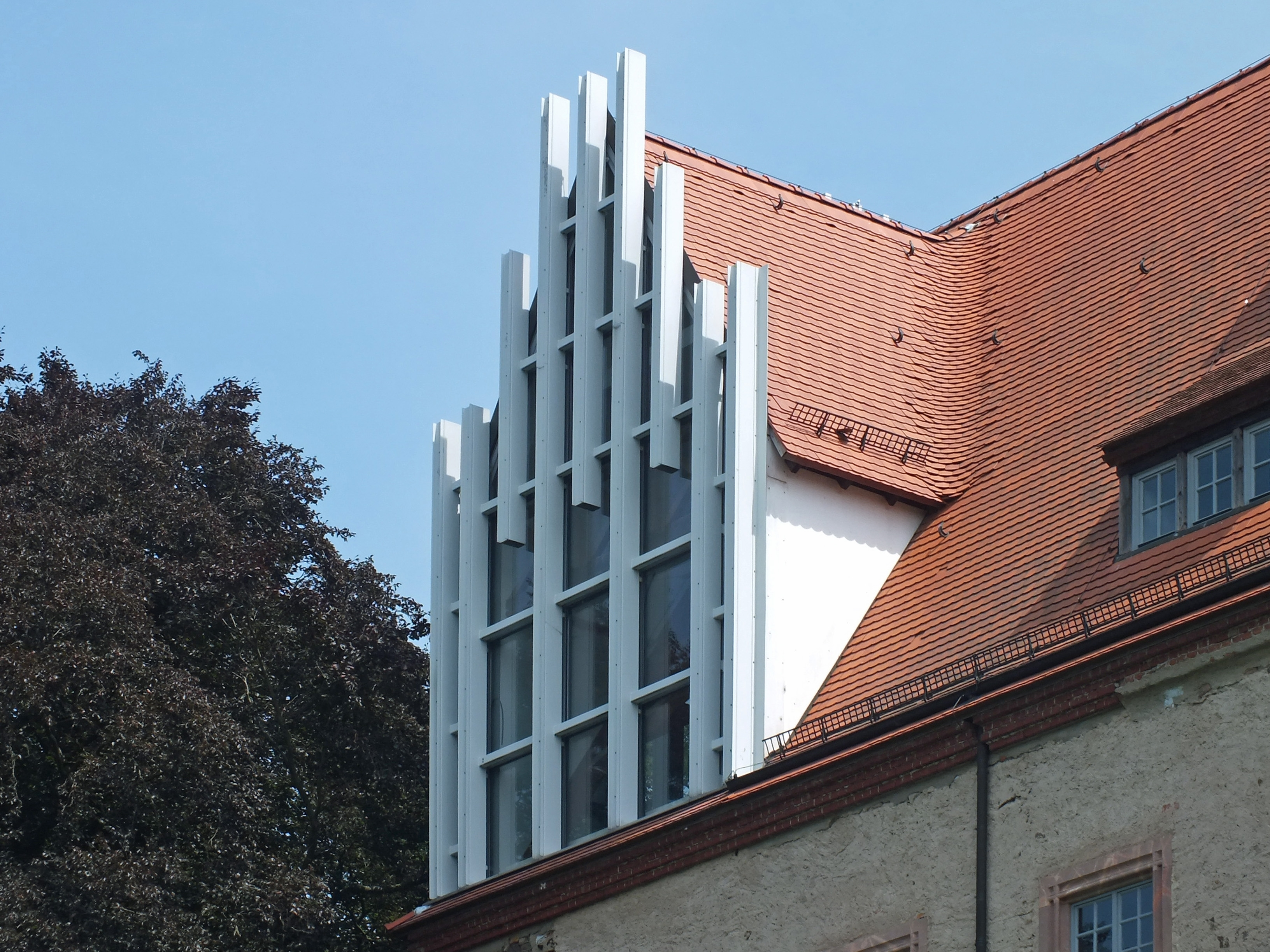 Modern gestalteter Treppengiebel am Schloss Trebsen